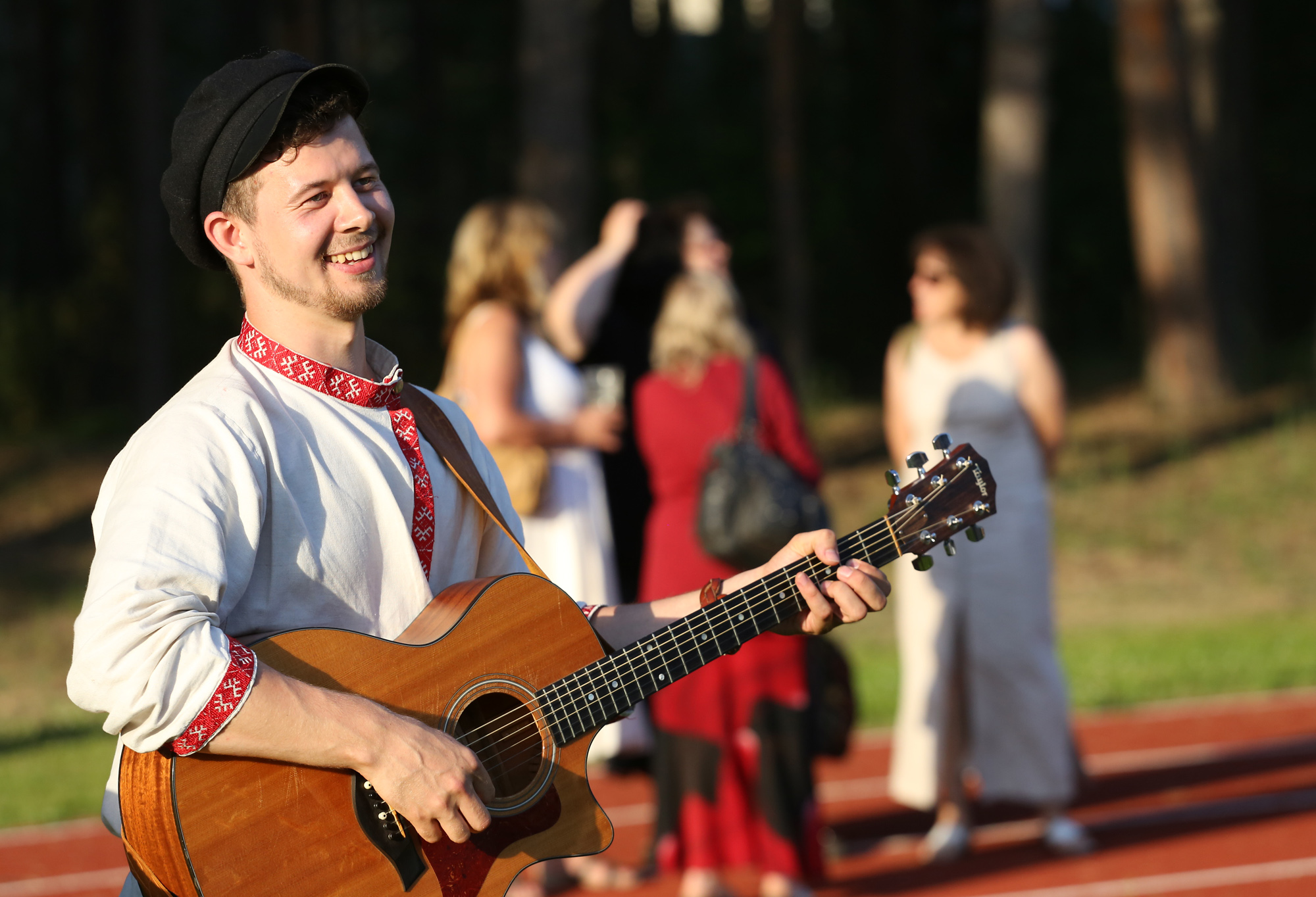 Jalmar Vabarna Värska staadionil